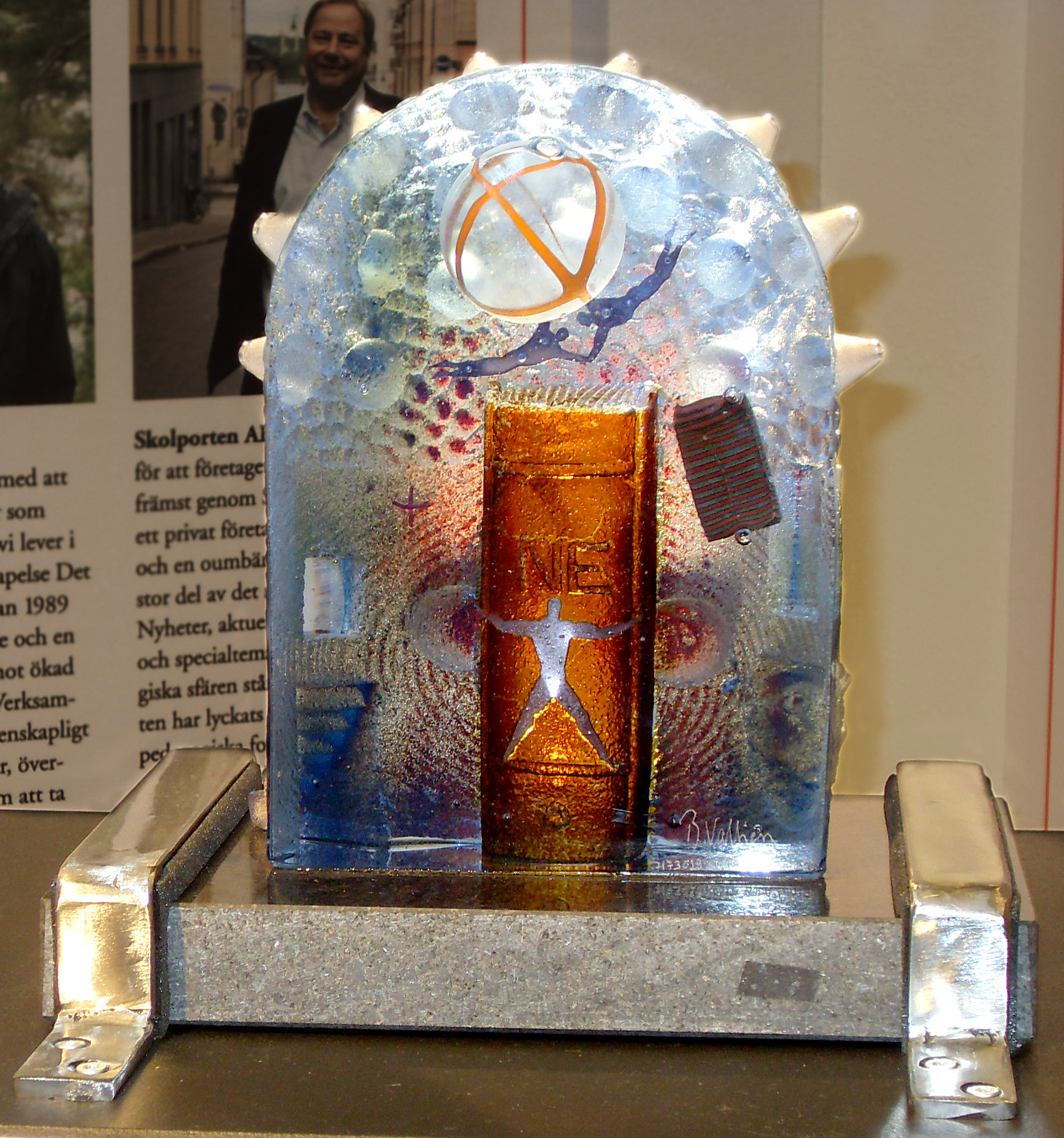 Bild av Kunkapspriset, Nationalencyklopedin